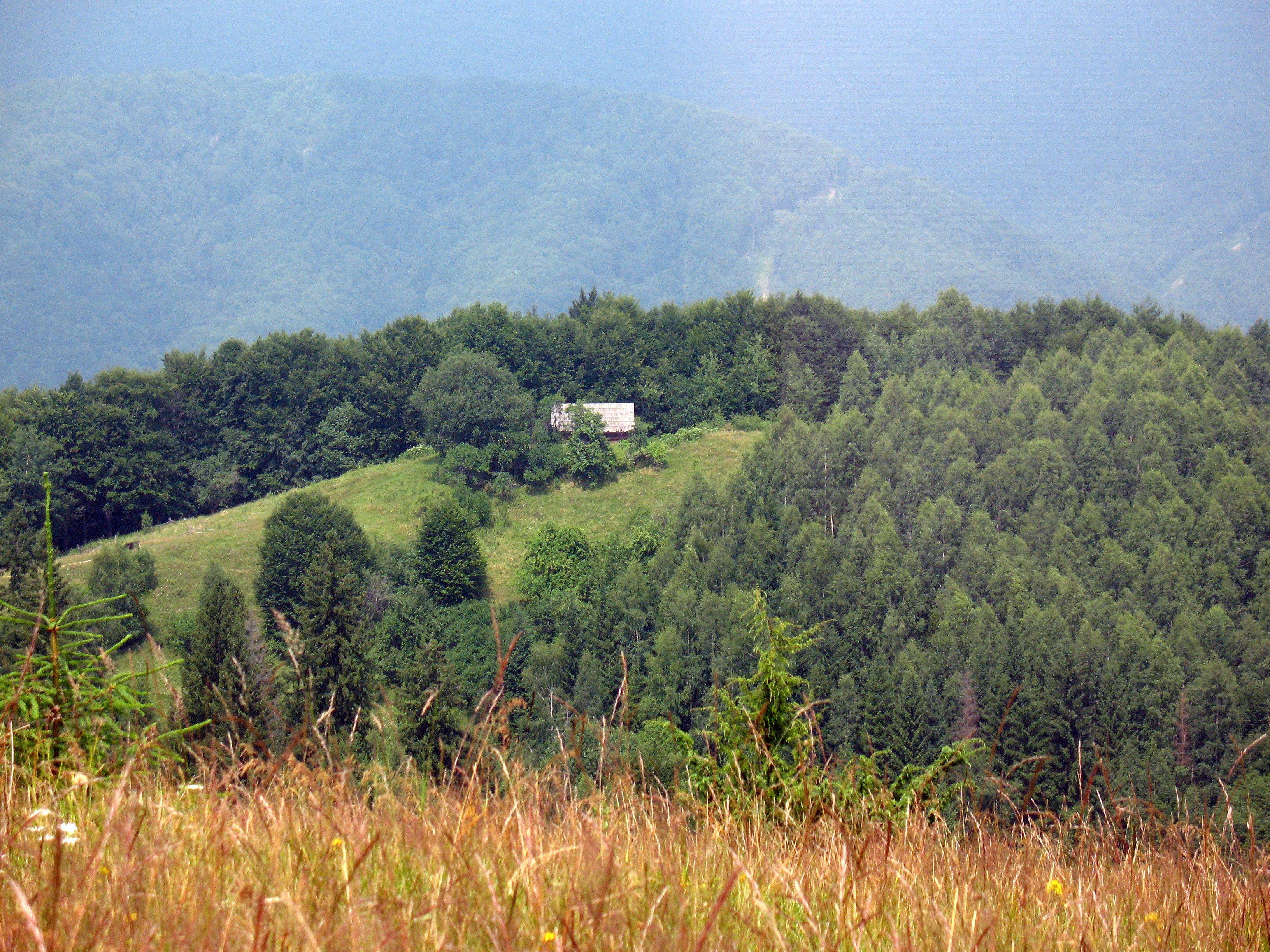 Село Брустурів у Косівському районі Івано-Франківської області України